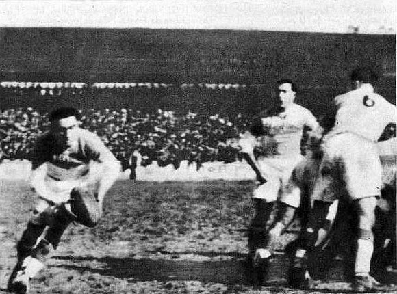 1936 (8 mars) victoire de l'Aviron bayonnais dans le Challenge du Manoir, au stade des Ponts-Jumeaux à Toulouse (ici leur demi de mêlée Cunibert, en sortie de mêlée).